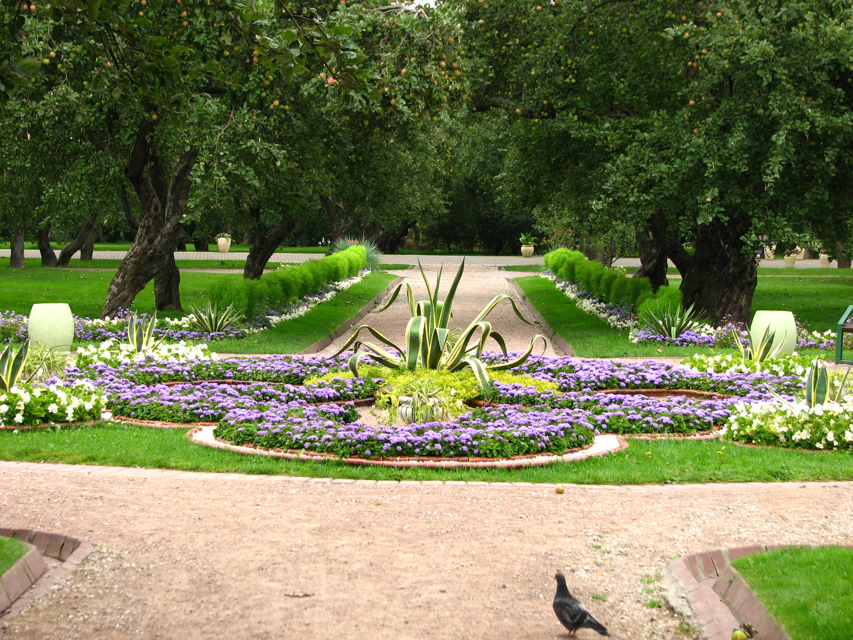 Flower beds in park Kolomenskoye.